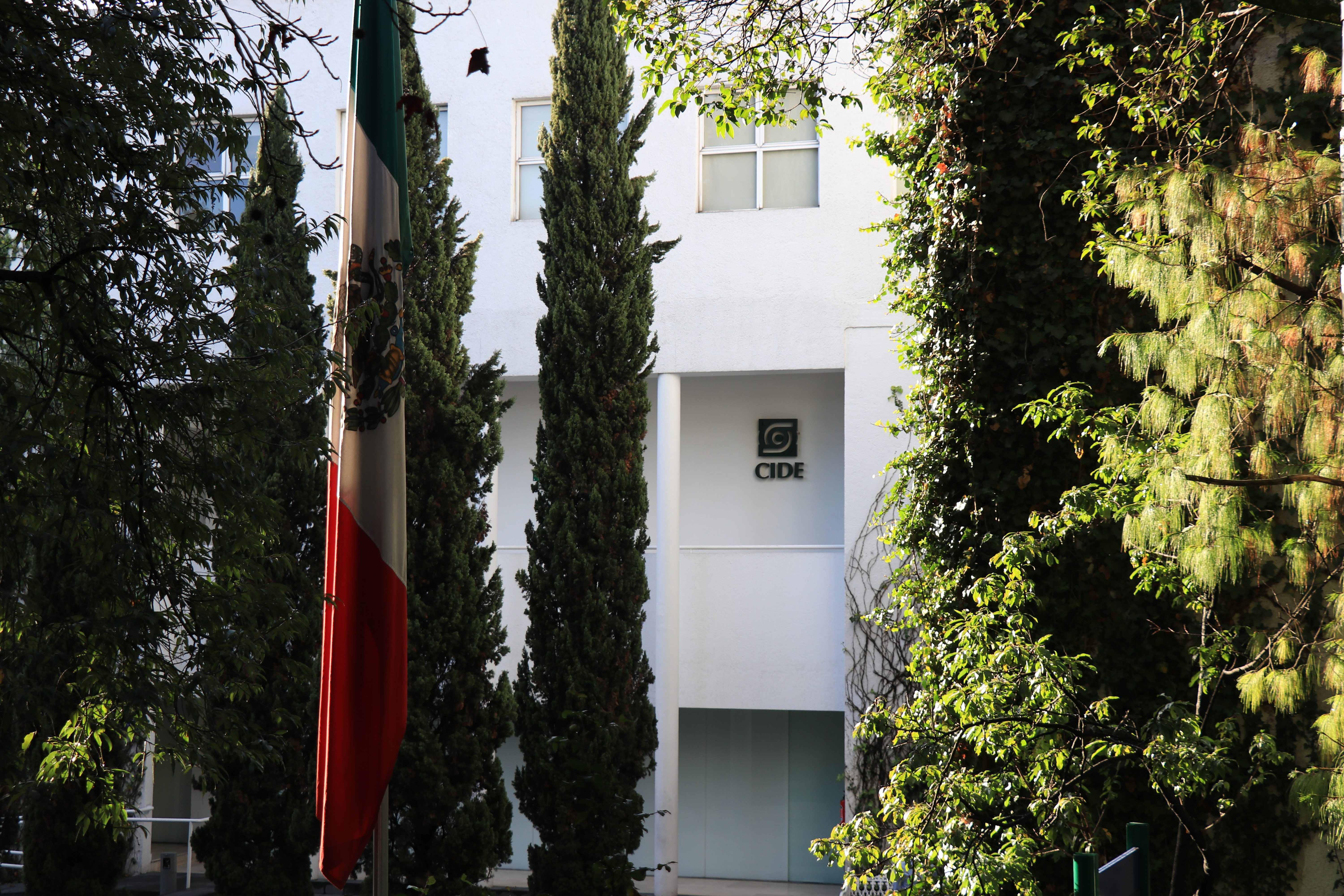 Vista a la explanada del CIDE